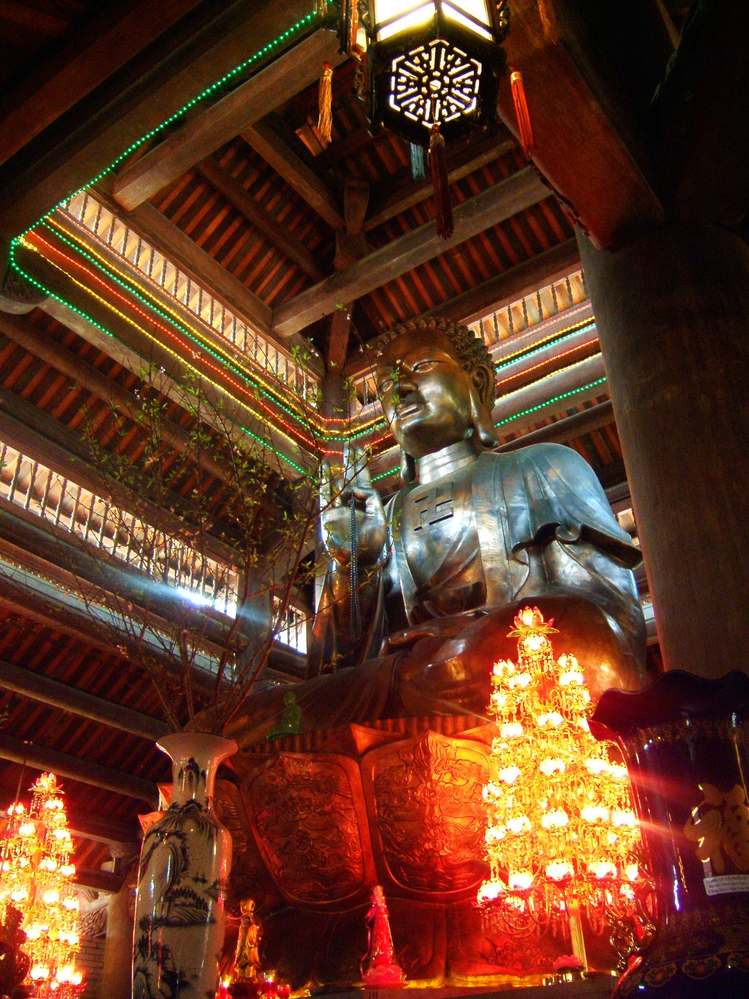 Pho tượng Phật bằng đồng nguyên khối lớn nhất Việt Nam, dựng tại chùa Non Nước, Sóc Sơn ngày 9 tháng 2 năm 2003.